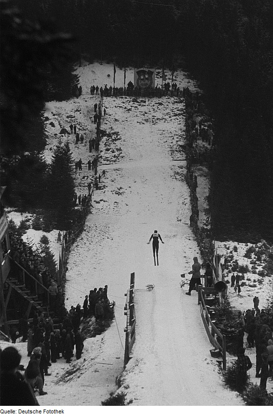 Original image description from the Deutsche Fotothek Skispringen auf der "Schanze des Friedens"